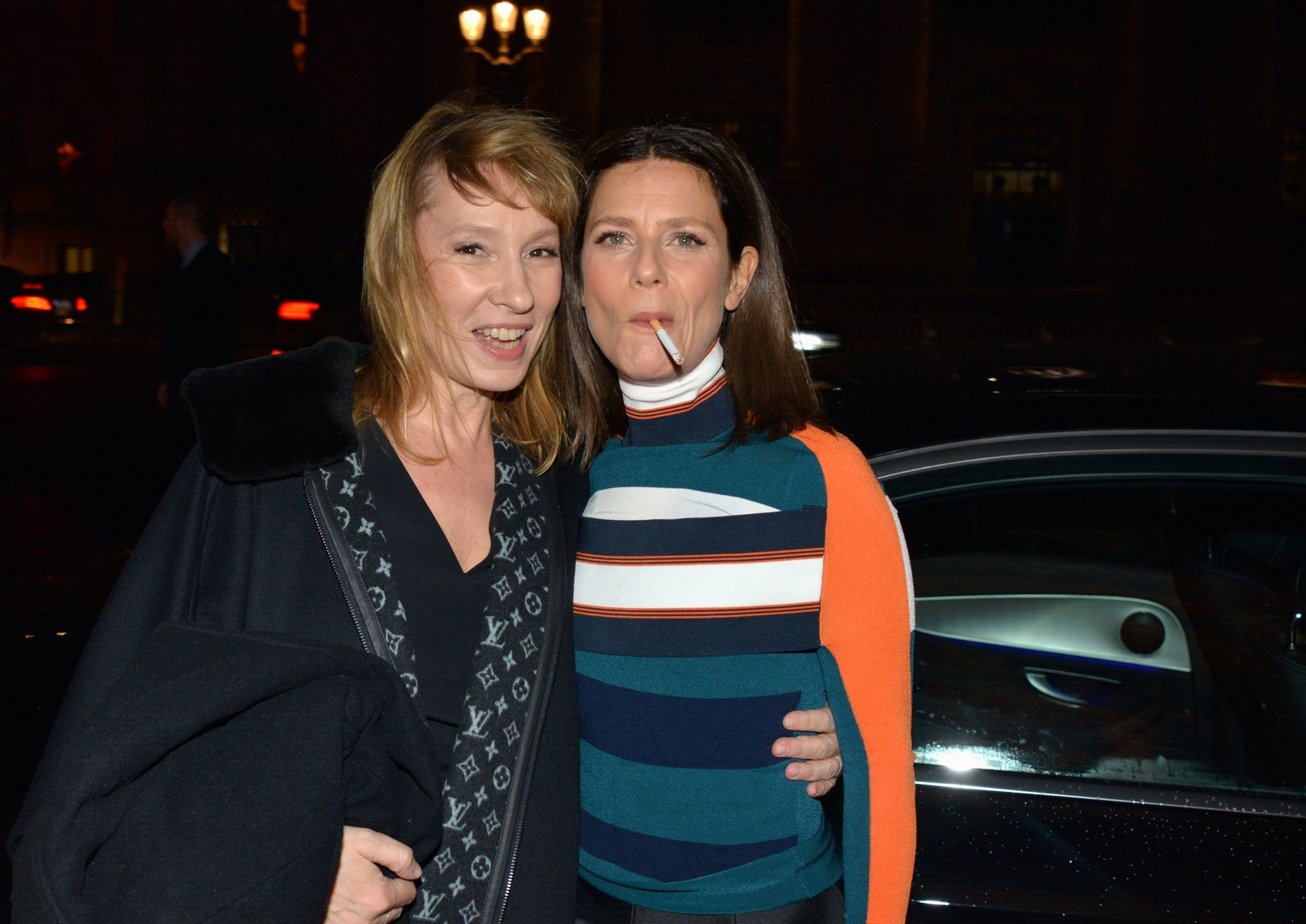 Emmanuelle Bercot et Marina Foïs au dîner des révélations des César du cinéma